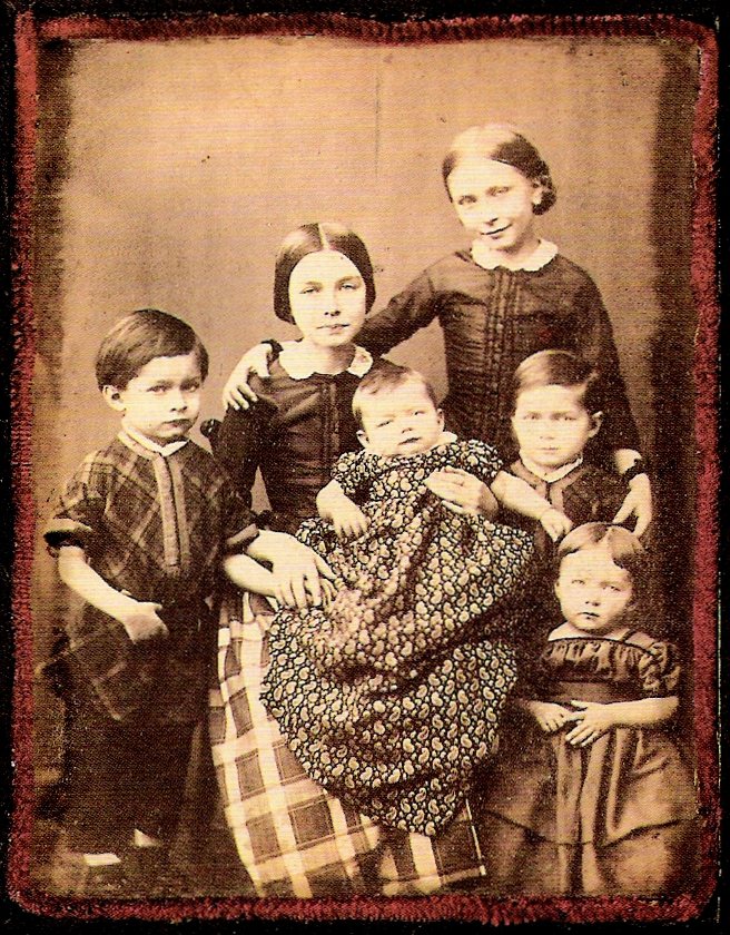 Die Kinder von Robert und Clara Schumann; v.l.n.r.: Ludwig, Marie, Felix, Elise, Ferdinand und Eugenie. Julie und Emil fehlen. Ambrotypie von 1854